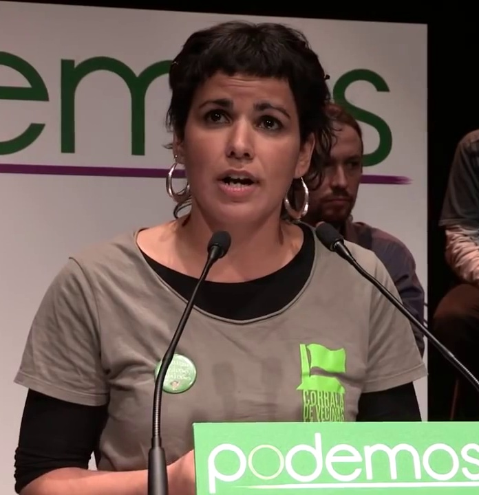 Teresa Rodríguez 16-01-2014